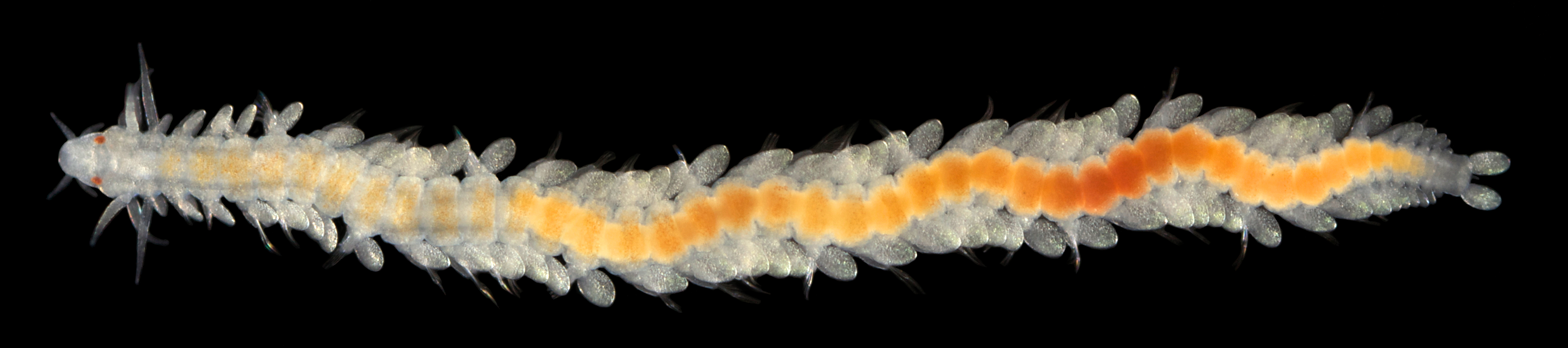 Paranaitis kosteriensis